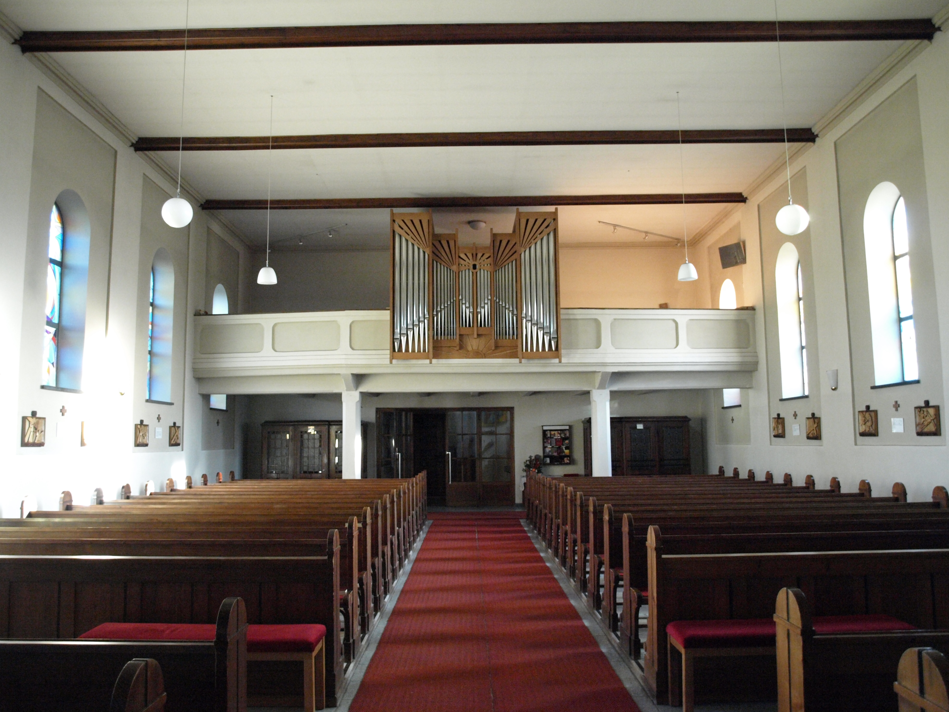 Kath. Pfarrkirche Hl. Familie